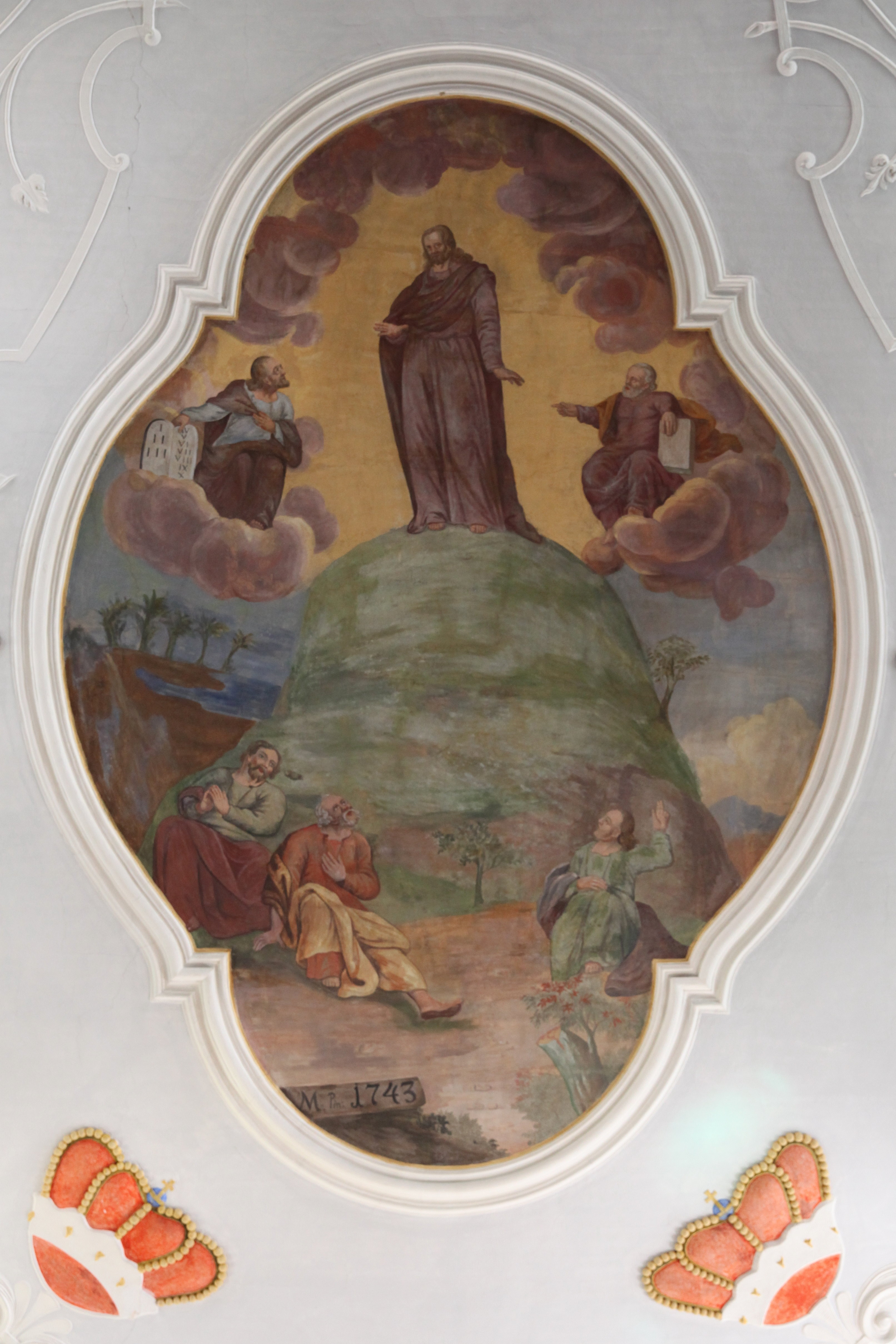 Deckengemälde Verklärung des Herrn, Evangelische Marienkirche in Watzendorf